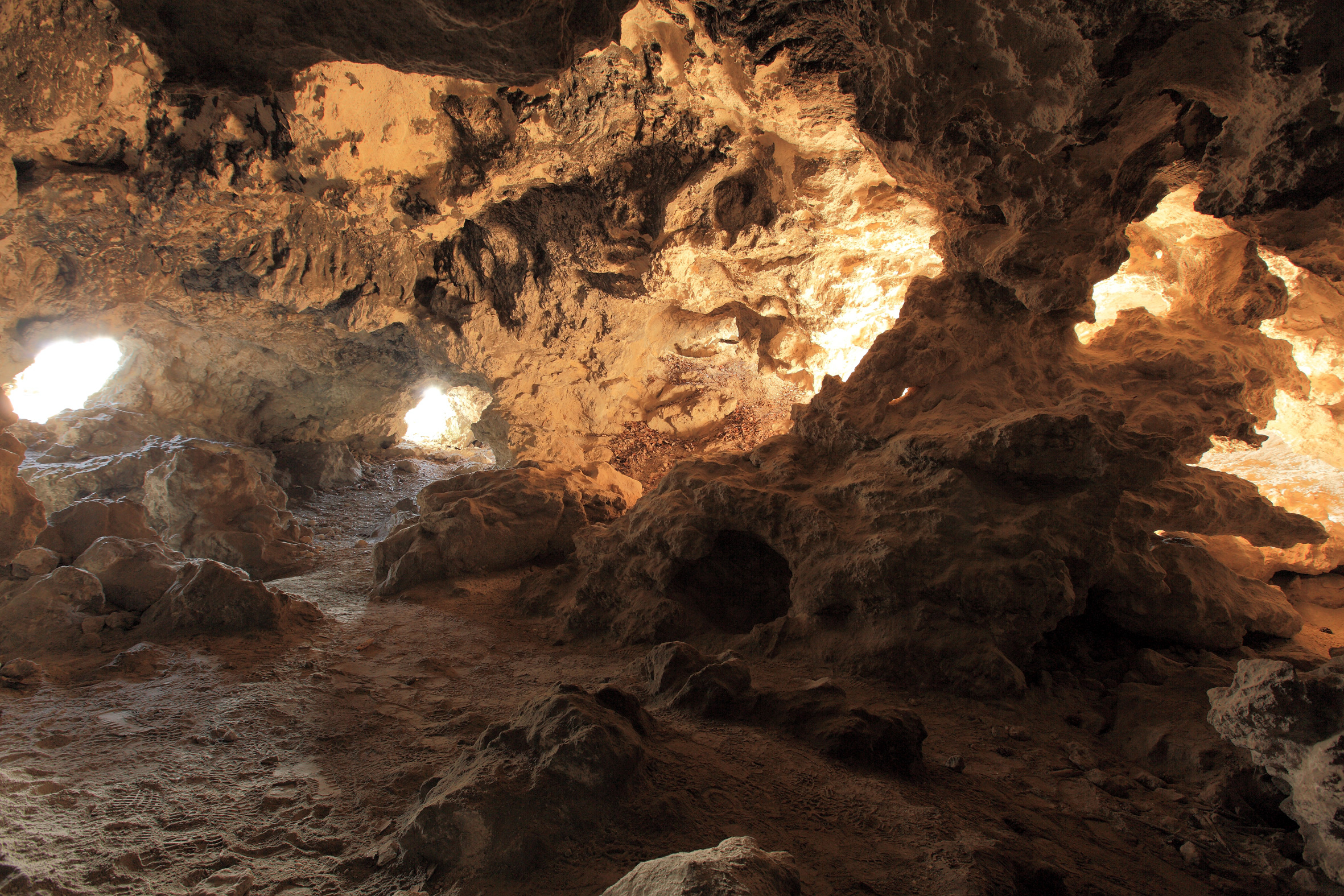 Einödhöhle This media shows the natural monument in Lower Austria with the ID BN-029.